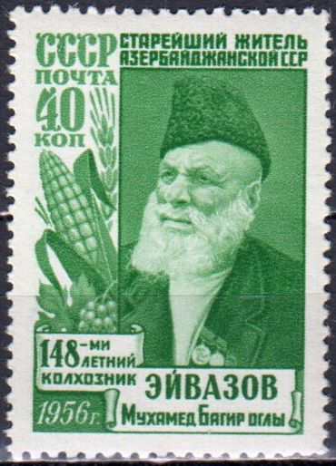 СССР 1956г старейший житель Азербайджана Махмуд Эйвазов 1842 - почтовая марка (с ошибкой - Мухамед вместо Махмуд)